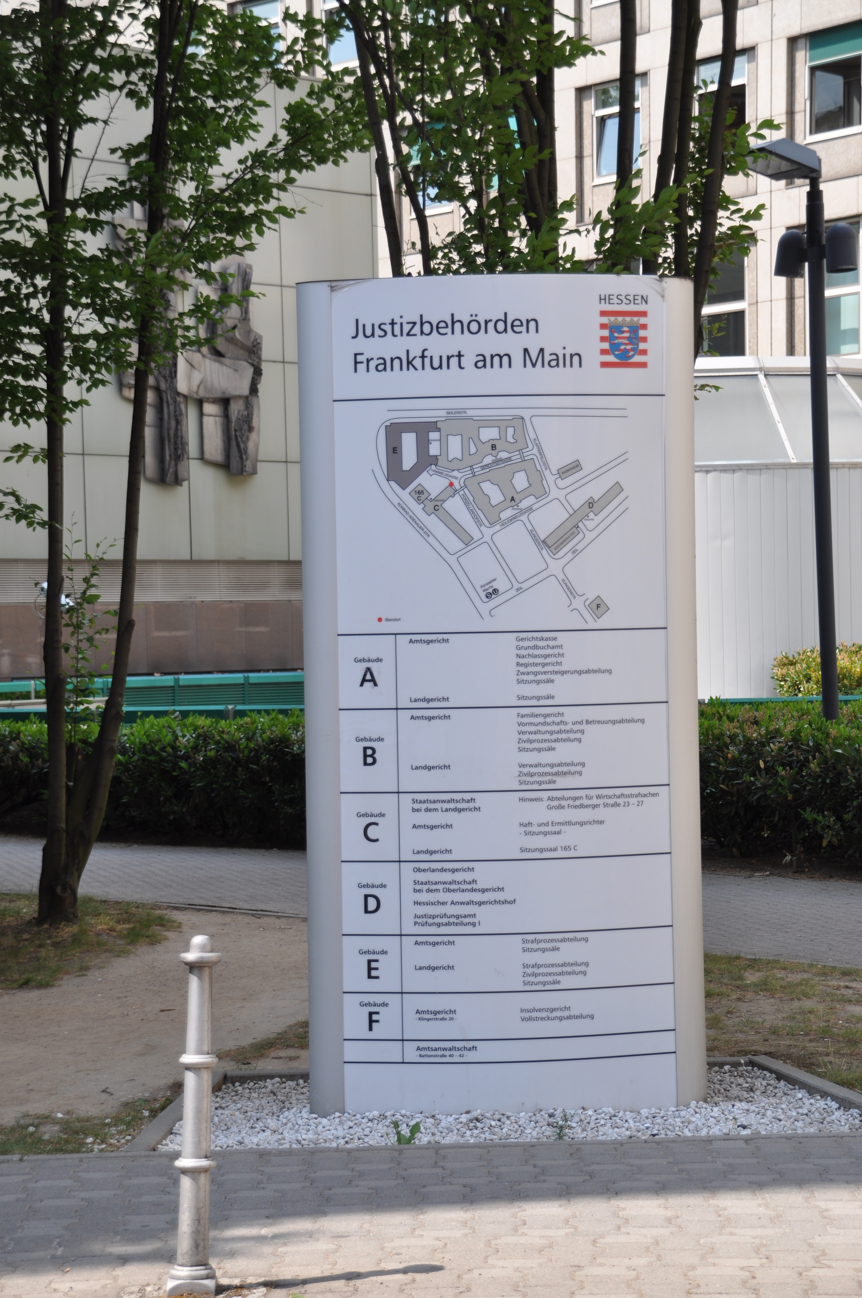 Wegweiser (vor dem Dienstgebäude C) zur ordentlichen Gerichtsbarkeit in Frankfurt am Main